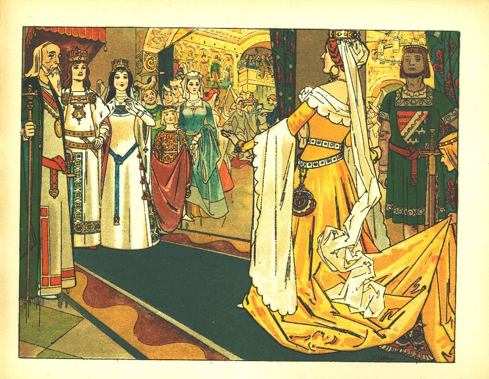 Franz Jüttner (1865–1925): Illustration from Sneewittchen, Scholz' Künstler-Bilderbücher, Mainz 1905